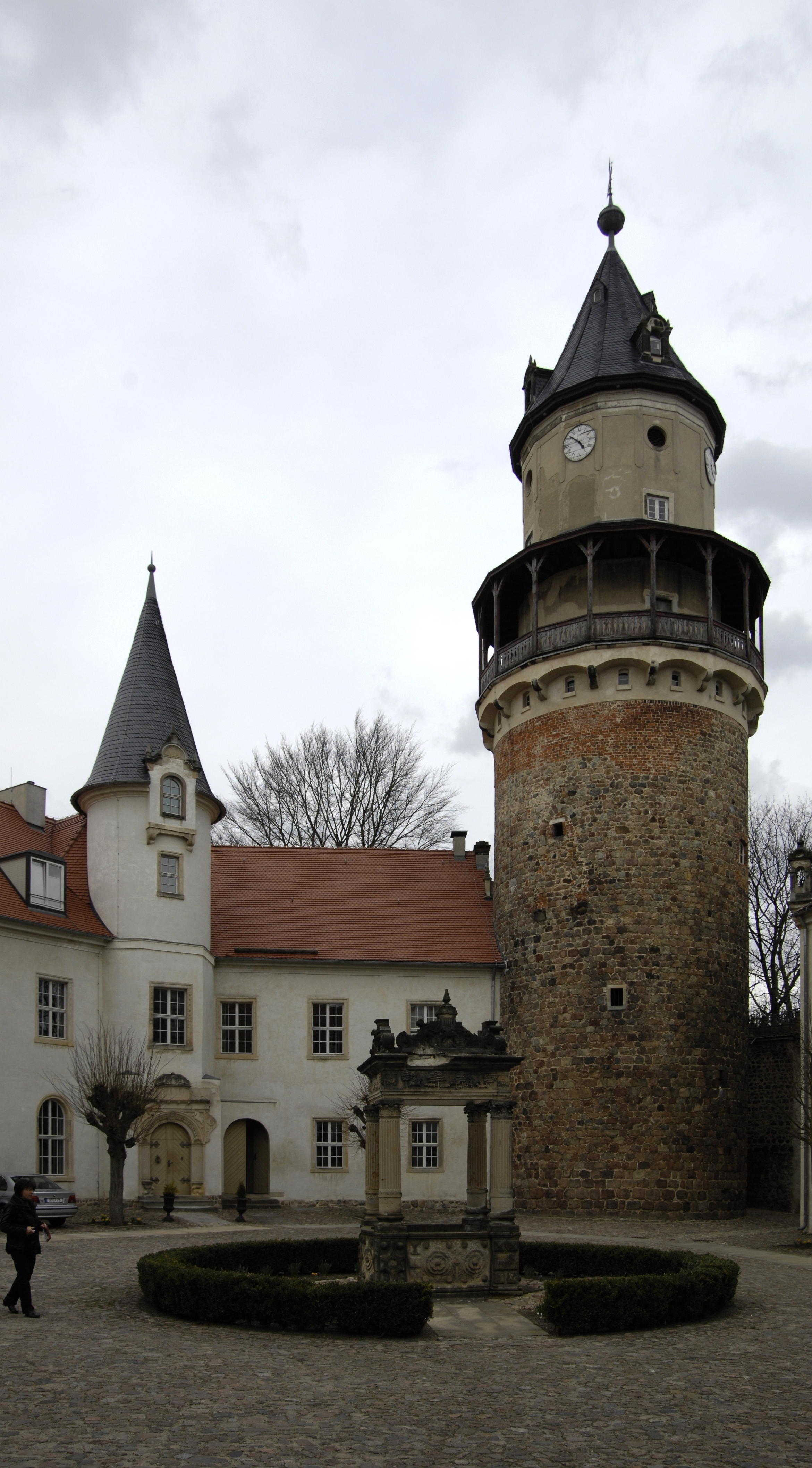 Innenhof Wiesenburg in Brandenburg